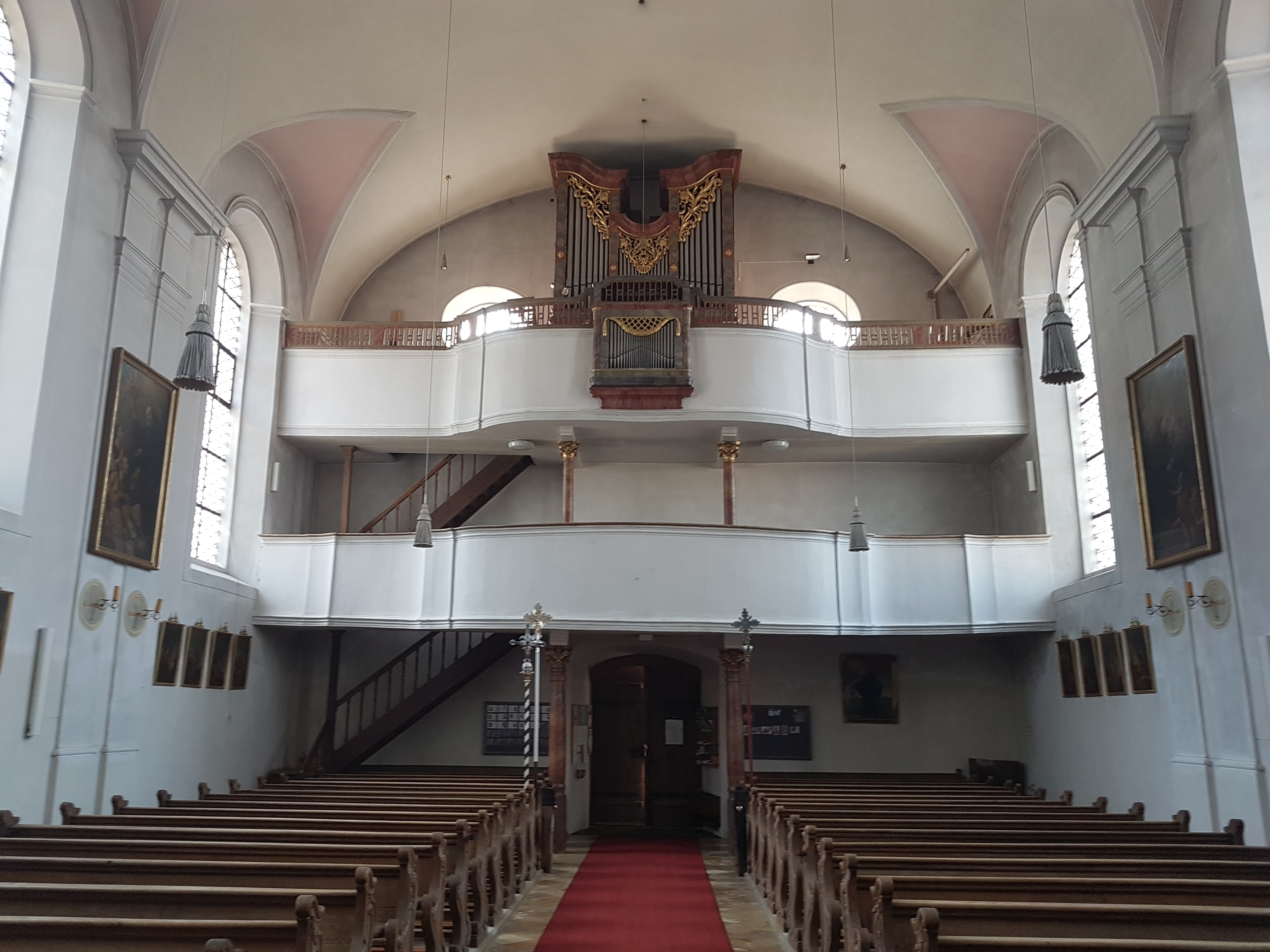 Ohlstadt, St. Laurentius